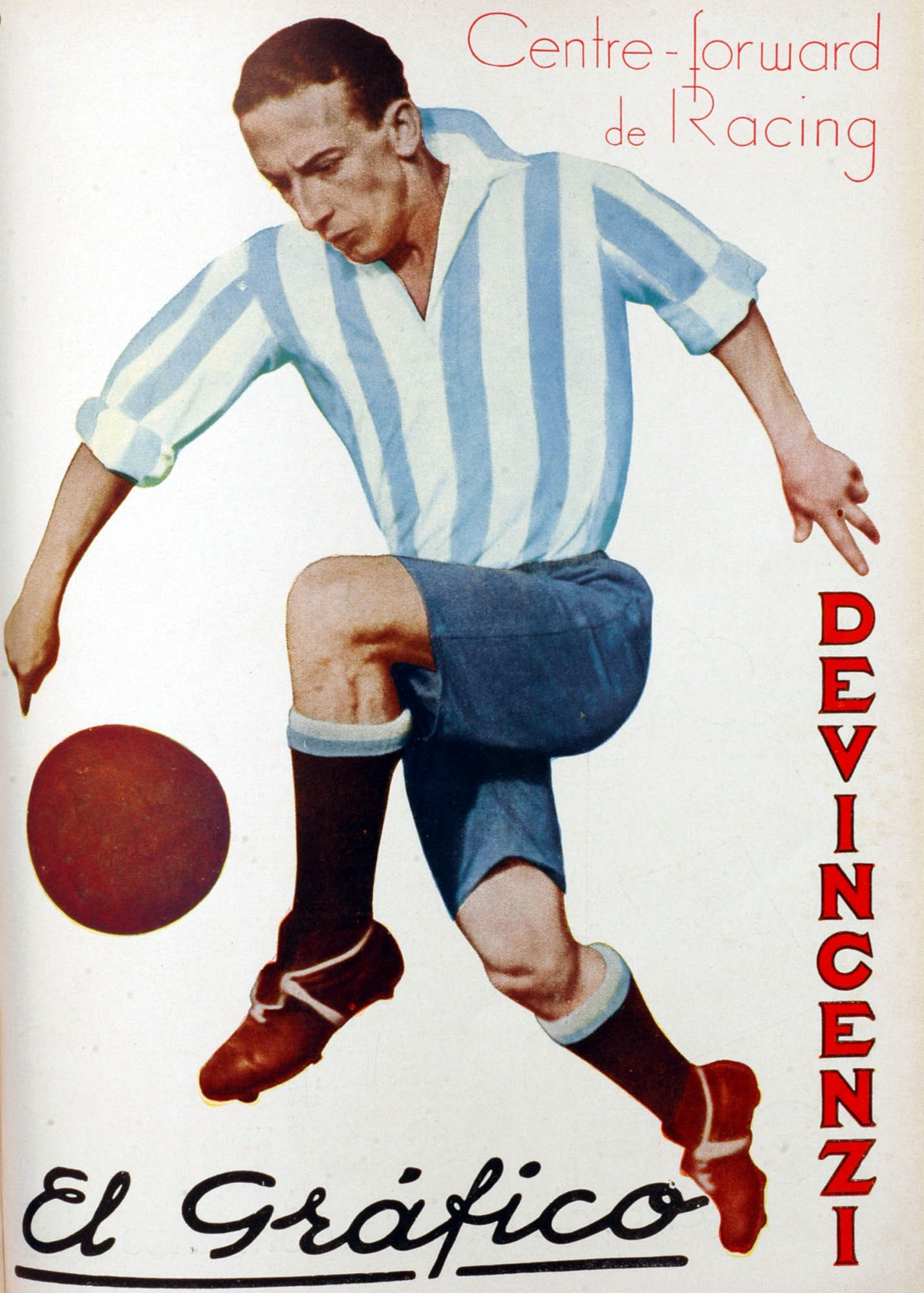 El Grafico del 23 de Abril de 1932. Edicion 667